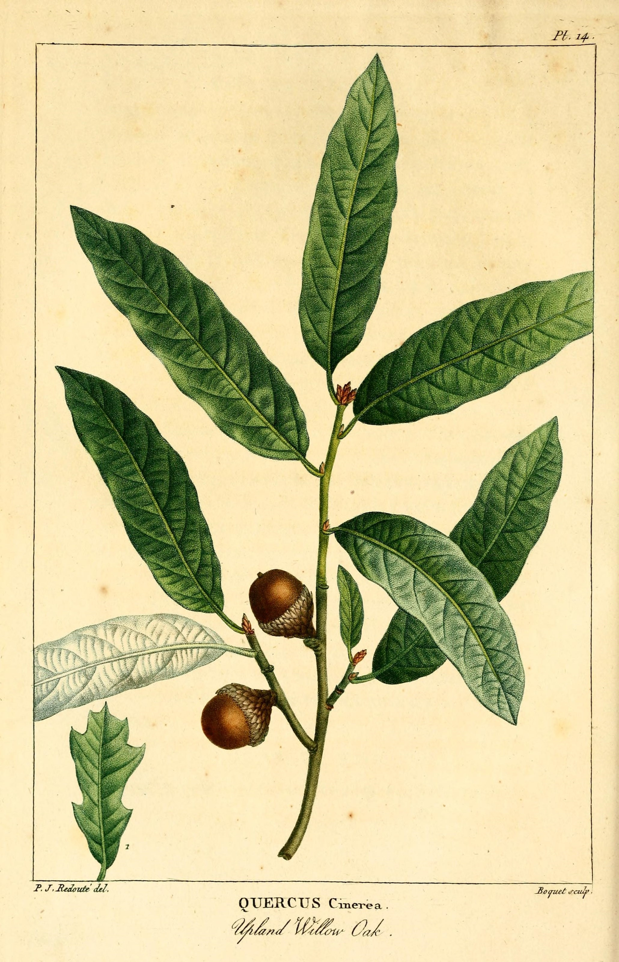 Ff. 14^ T. J, lUdoicte Je!. QXTERCXJS Cmei-ea. Joauei j-cuIj.